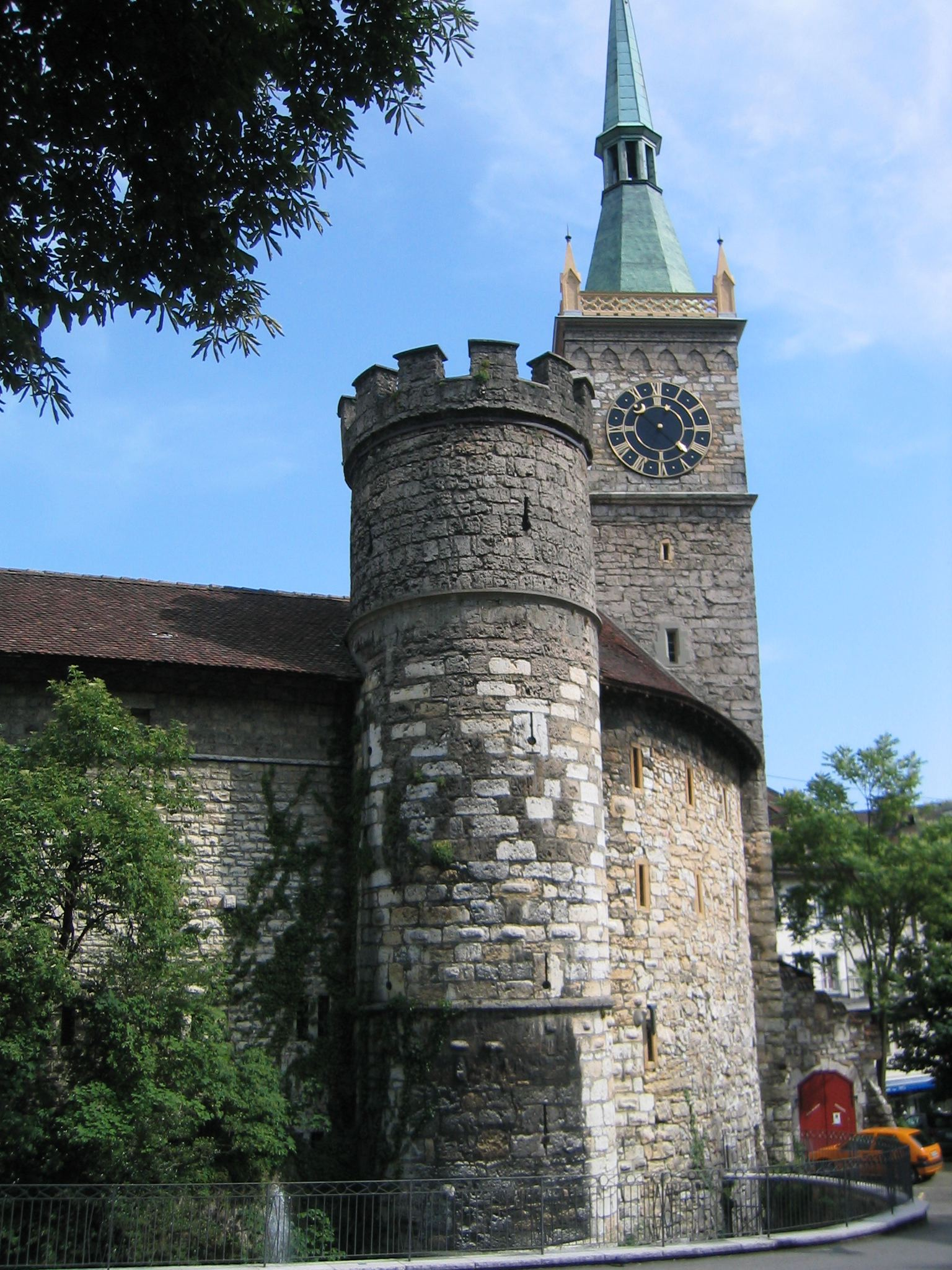 Biel/Bienne, Burgturm am Nordwestrand der Altstadt